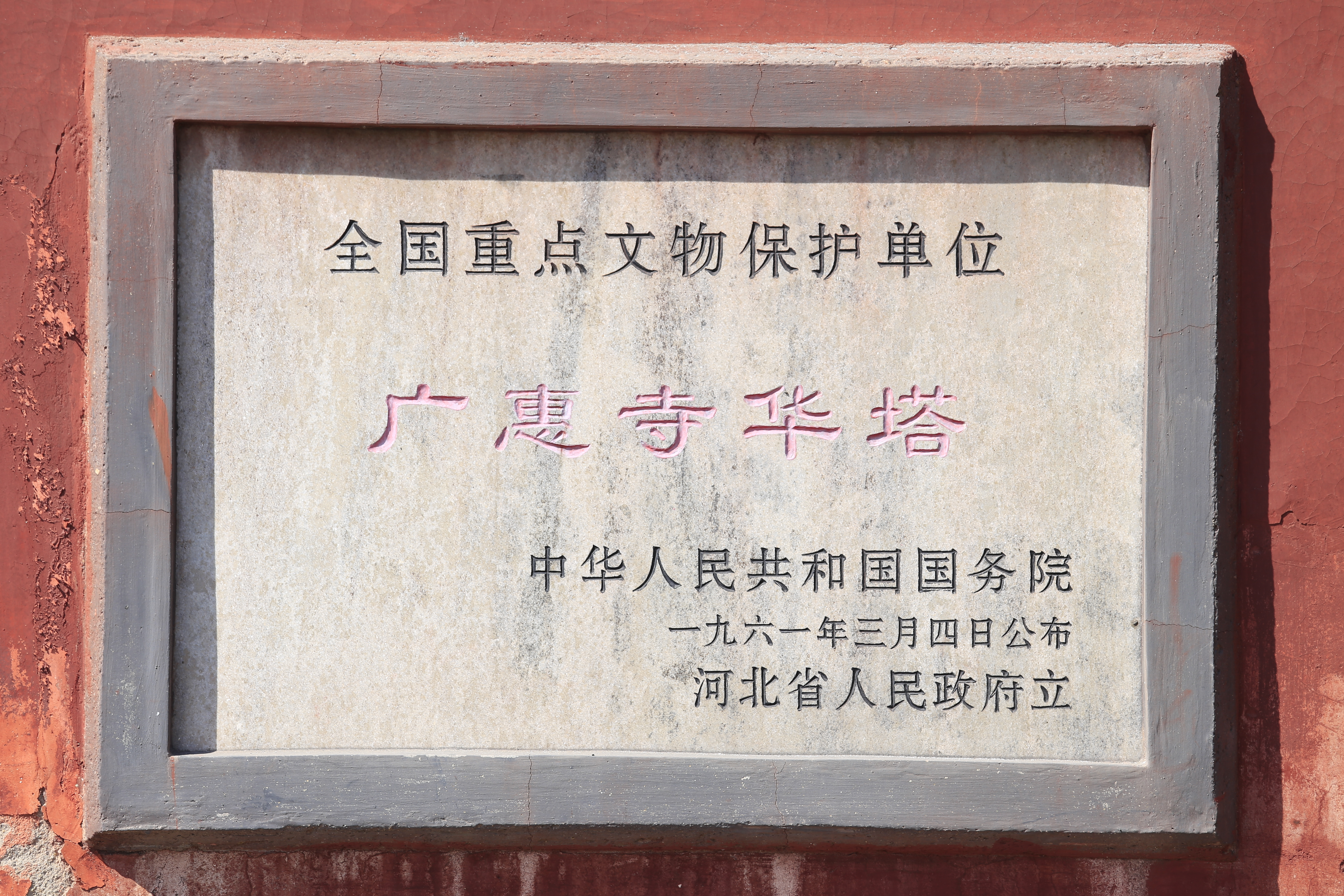 正定广惠寺华塔